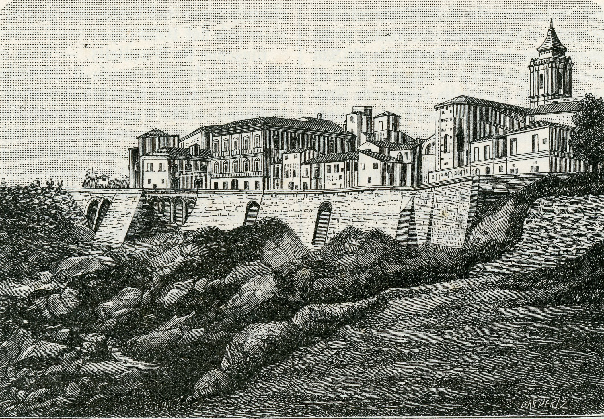 Vasto: parte orientale della città, dove il 1° aprile 1816 avvenne lo scoscendimento (xilografia di Barberis 1898).